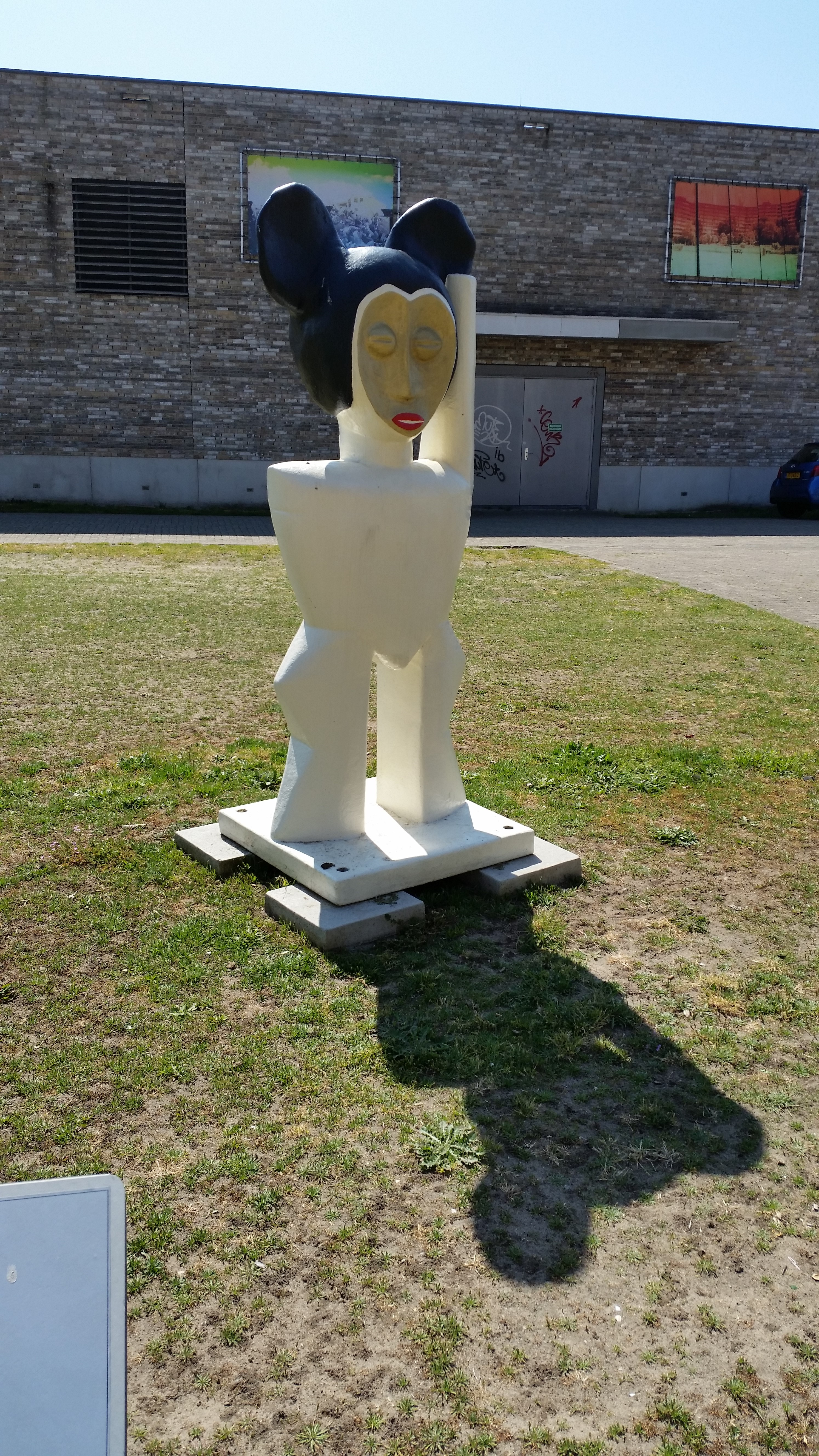 Kuboko Kumozi Kakinga van Monika Dahlberg op het Anton de Komplein, Amsterdam-ZO